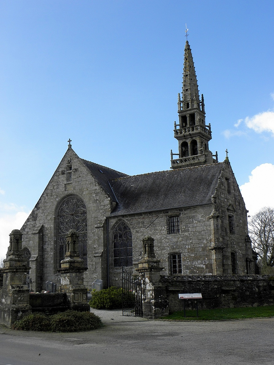 Église Notre-Dame de Pencran (29). Chevet et sacristie.